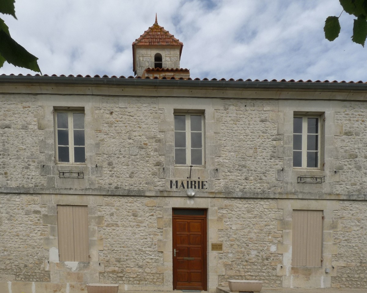 Mairie de Semillac, Charente-Maritime, France